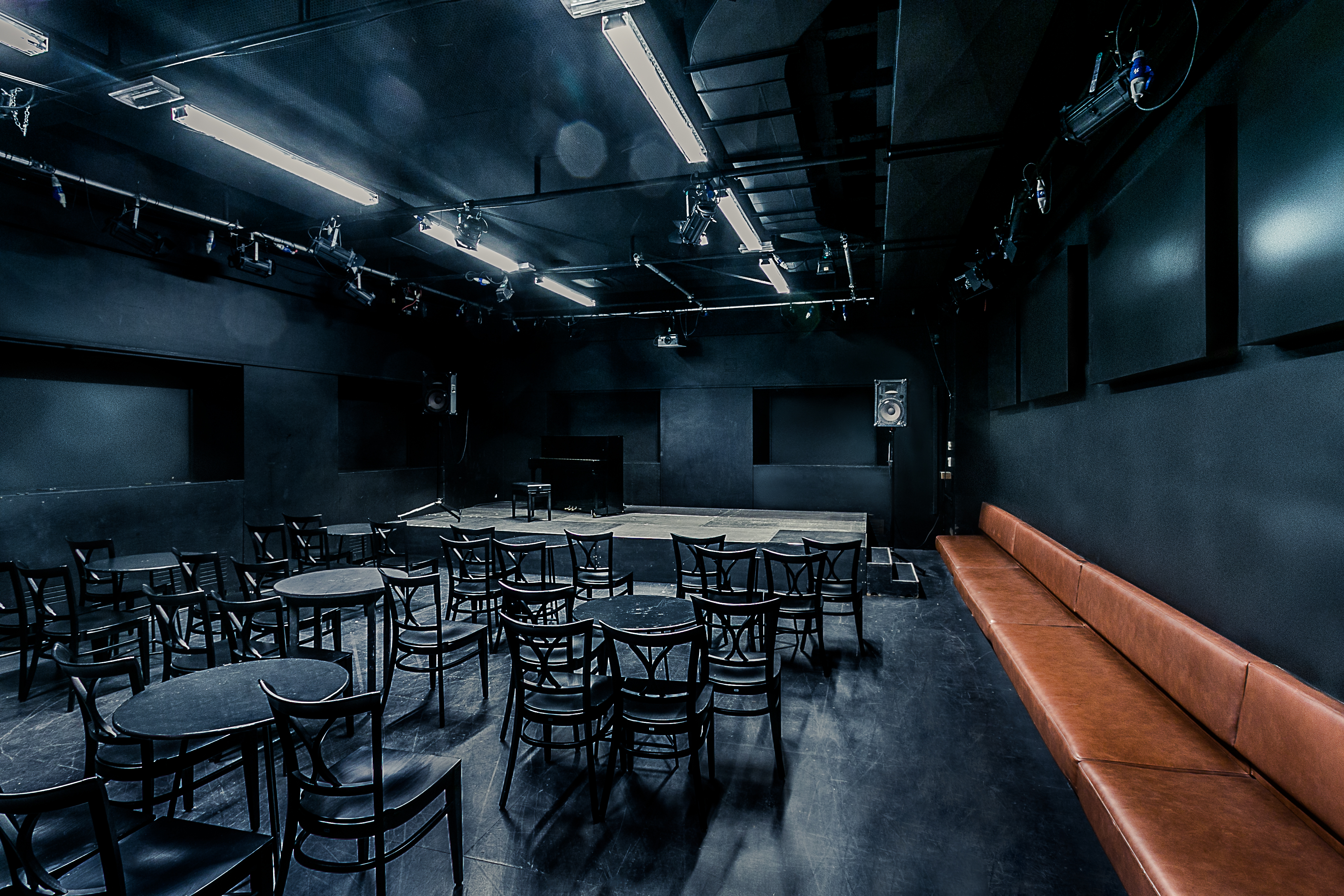 Schauspielhaus Graz - HAUS DREI